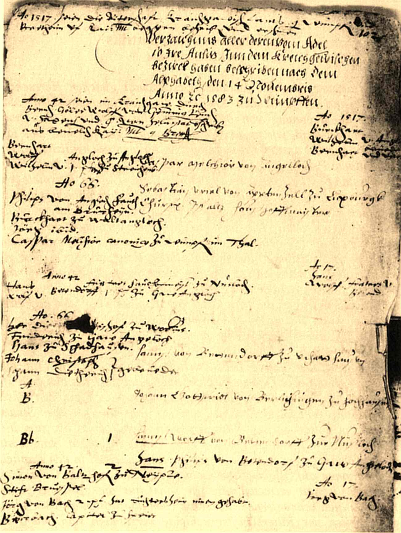 Liste der Mitglieder im Ritterkanton Kraichgau 1583 Text: Verzaichnus aller deren vom Adel so Jre Ansitz Jnn dem Kreichgewischen bezirck haben beschriben nach dem Alphabeth, den 14ten Nouembris Anno etc 1583 zu Wimpffen. [A] Caspar Melchior von Angelloch Sebastian Vriel von ApptenZell zu Luxburgk, Churf[ürstlicher] Pfaltz hauß hoffmeister [freier Raum für weitere Einträge] [B] Hannß von Bettendorff zu Schatthausen Johann Gottfridt von Berlichingen zu Hochhausen [1. (Nummerierung nachgetragen)] Hannß Wolff von Bettendorff zue Nußloch [2. (Nummerierung und Eintrag nachgetragen:) Hans Philips von Bettendorf zu Gaw Angelloch] [Transkribiert wurde nur die ältere Textschicht. Die weiteren Nachträge der jüngeren Textschicht mit Zusätzen betreffend die Jahre 1517, [15]42 und [15]66 wurden nicht transkribiert.]